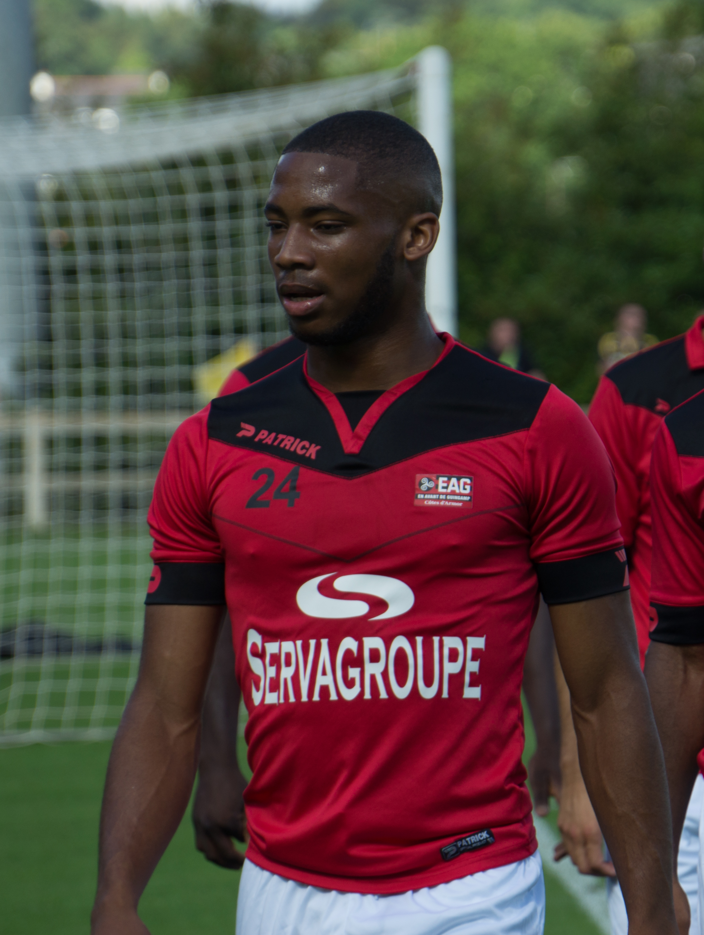 Marcus Coco